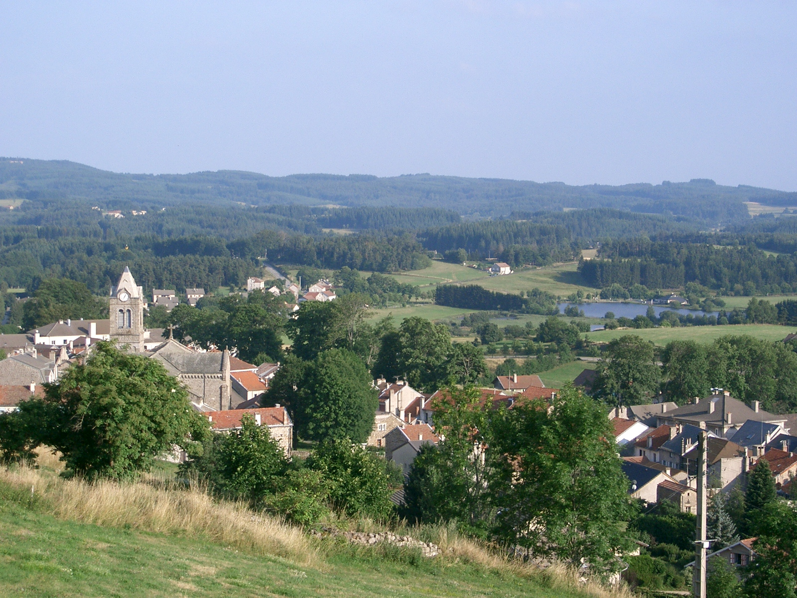 Saint Agrève depuis le mont Chiniac - Ardèche - France self made PRA